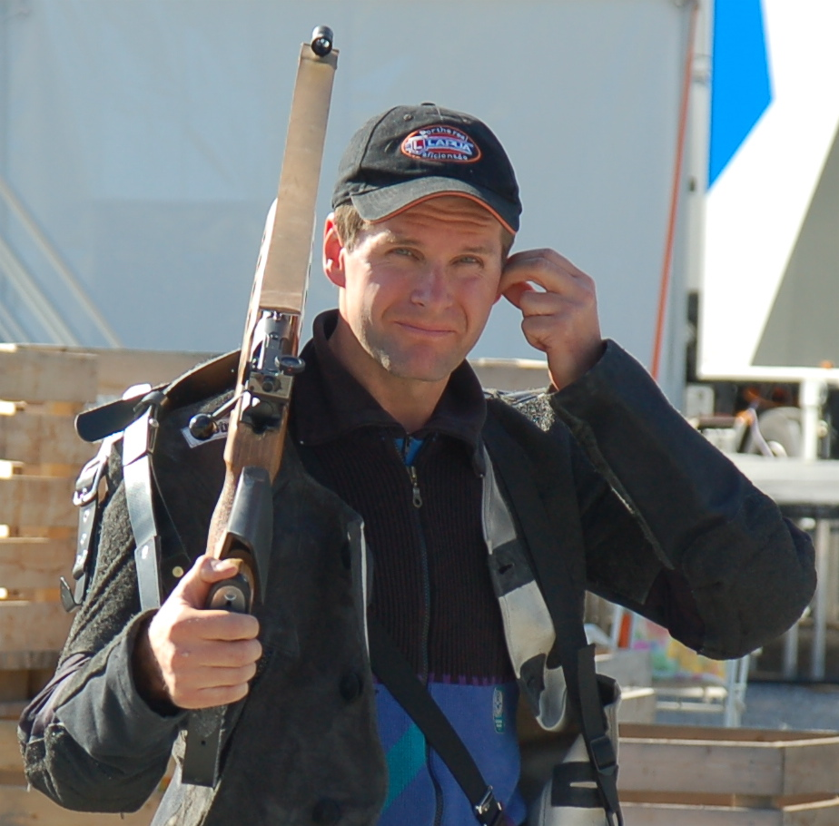 Espen Berg-Knutsen at Landsskytterstevnet 2007